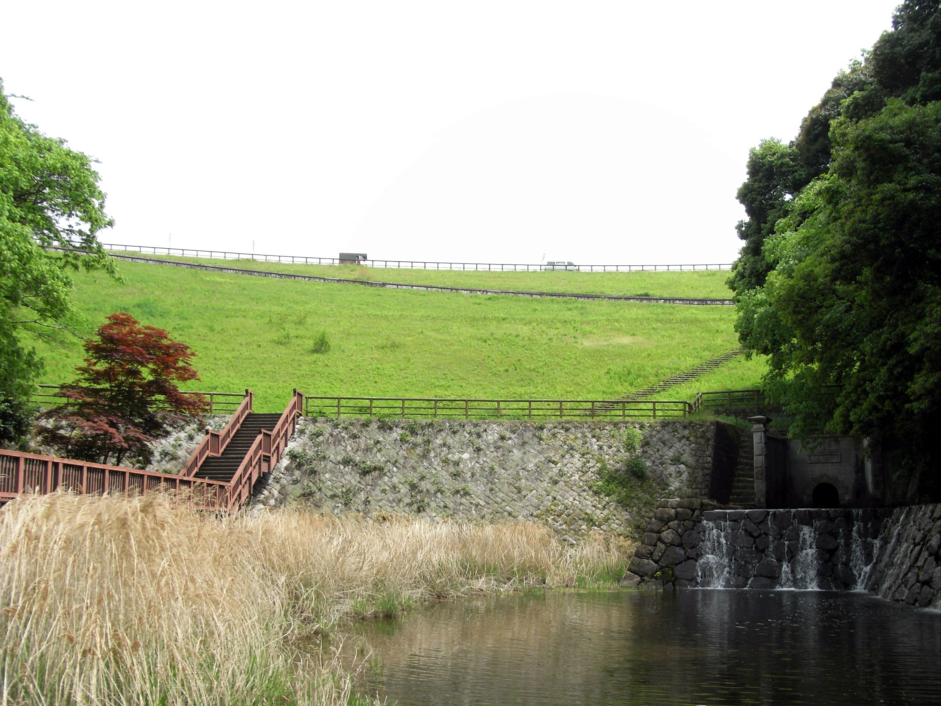 Dam